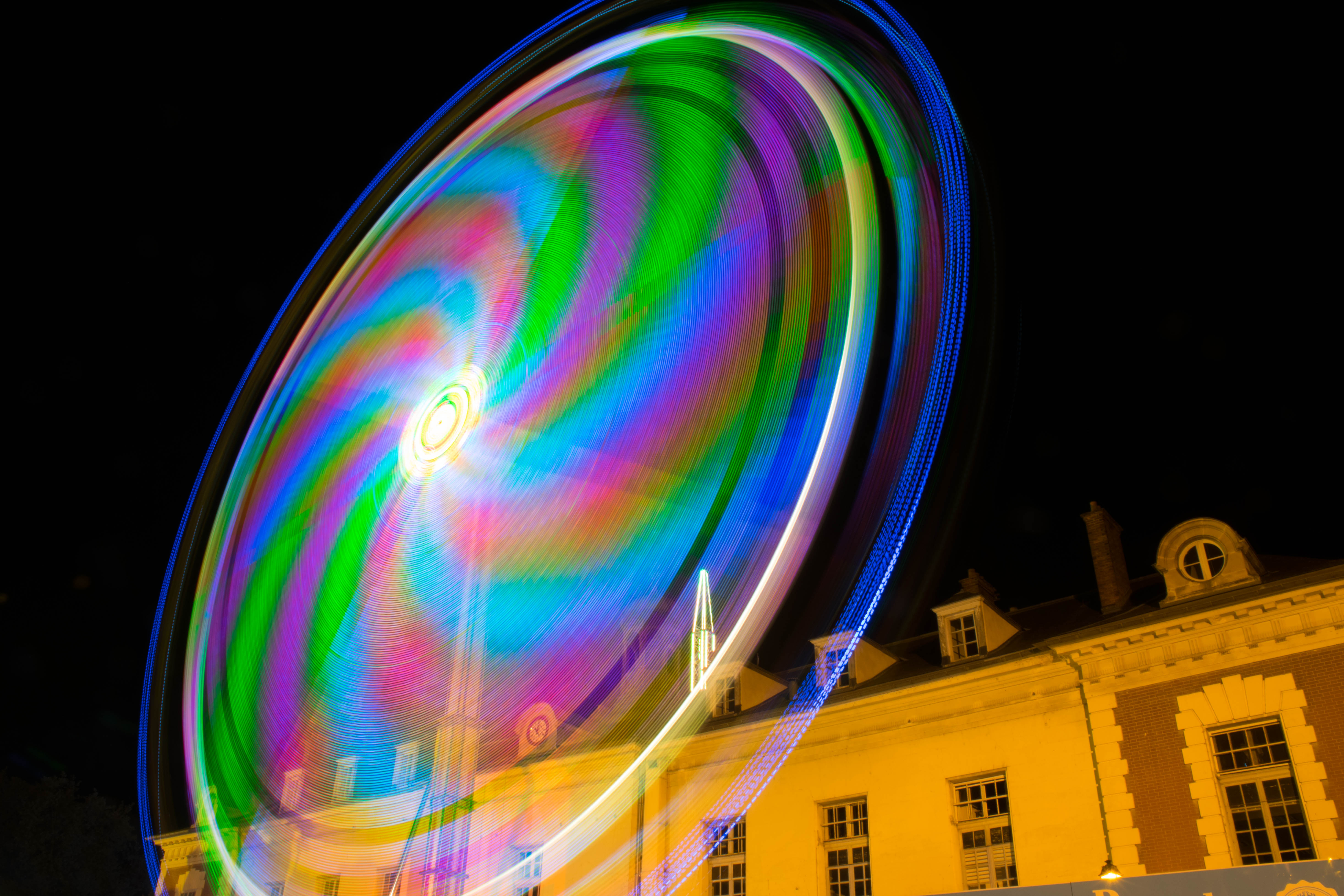 Fête foraine à Rambouillet (Yvelines, France), mai 2018.